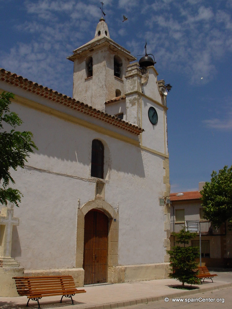 Iglesia de Peñascosa con la Cruz de los Caidos en la Fachada